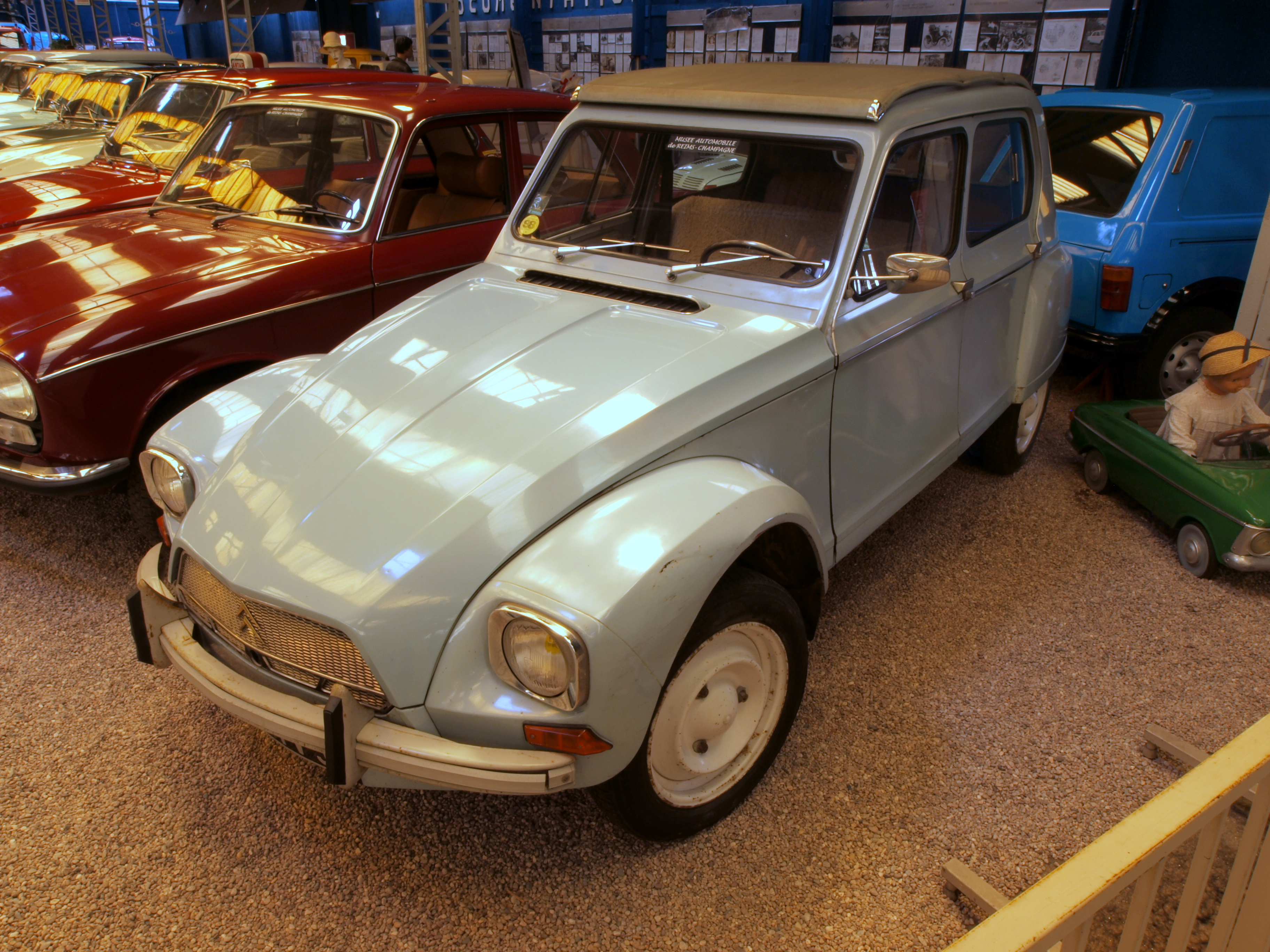 1969 Citroen Dyane 4